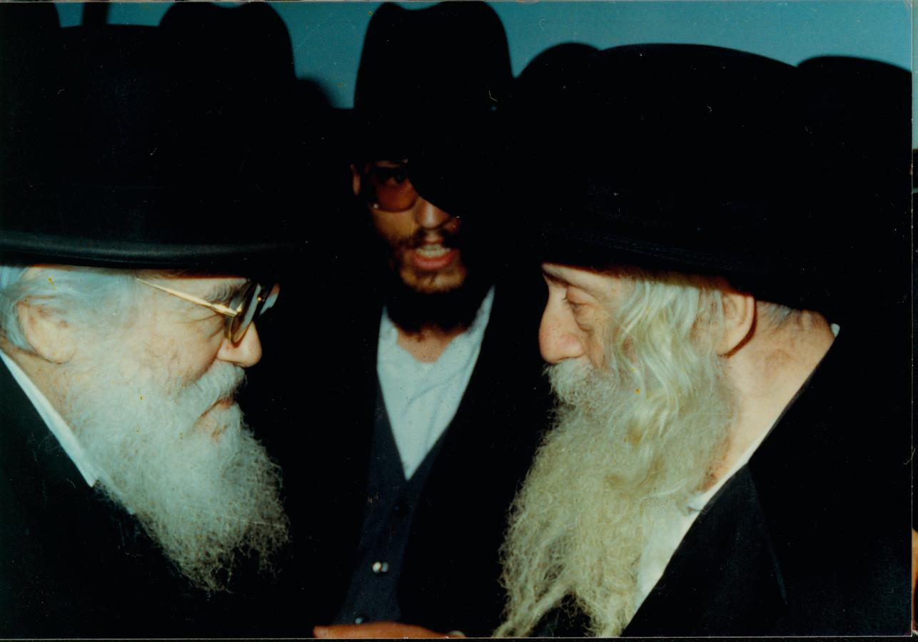 האדמו"ר השפע חיים מצאנז עם הרב אלעזר מנחם שך זצל